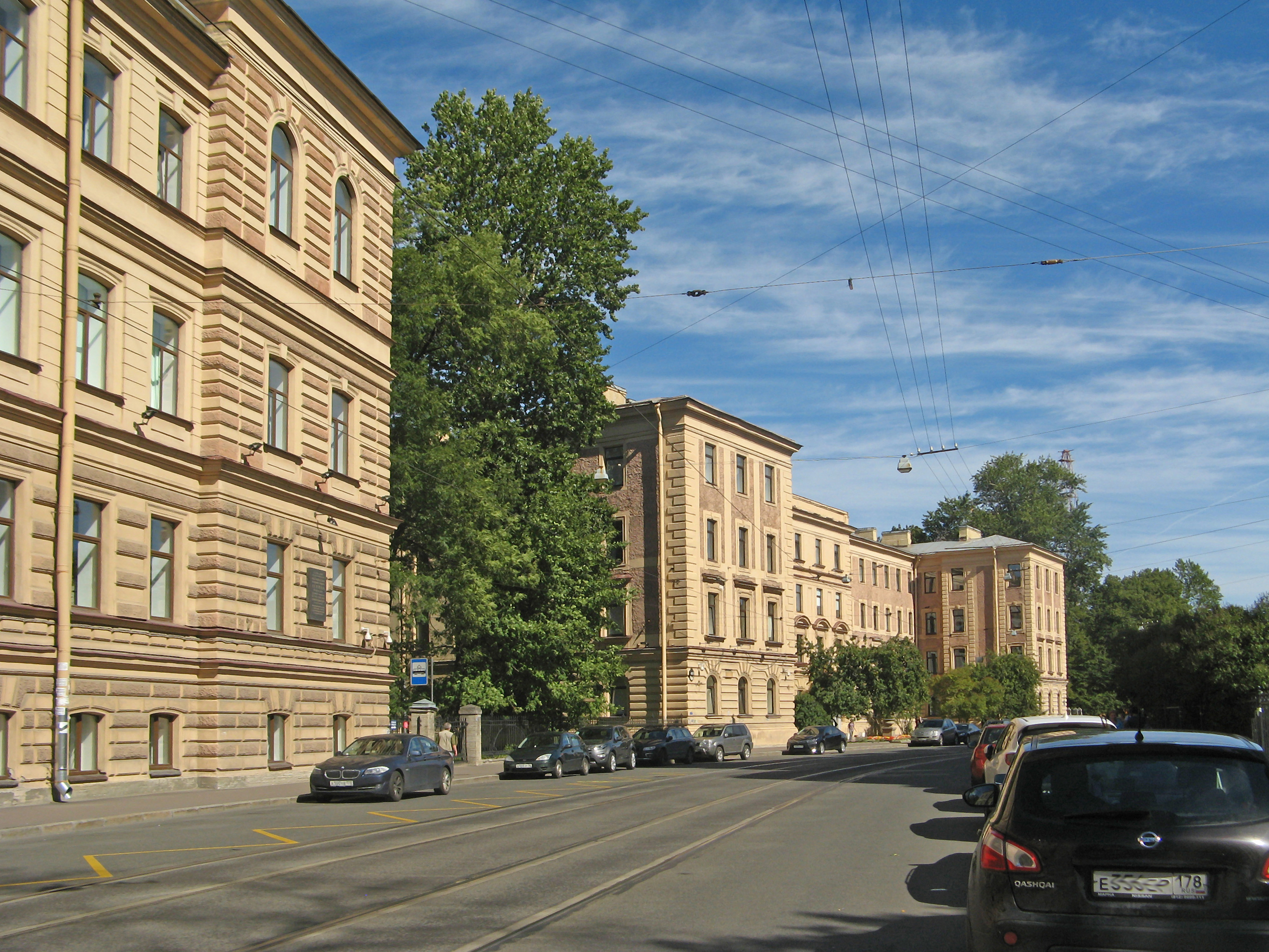 Институт Первый медицинский им. Академика Павлова И.П.: улица Льва Толстого, 6, Петроградский район, Санкт-Петербург